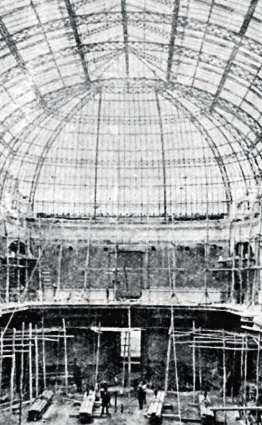 El Museo Nacional de Bellas Artes (MNBA) es uno de los principales centros de difusión de artes visuales tanto en Chile como en los demás países de la región. Fundado el 18 de septiembre de 1880, bajo el nombre Museo Nacional de Pinturas, ocupa desde 1910 un edificio ubicado en el sector del Parque Forestal, en la comuna de Santiago. El Palacio de Bellas Artes, obra del arquitecto franco-chileno Emile Jecquier, y construido en conmemoración del centenario del país fue nombrado monumento nacional en 1976